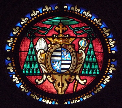 Armes de Mgr Jean-Louis de Bouschet de Sourches, évêque de dol de 1715 à 1748. Baie 29 du collatéral nord de la nef de la cathédrale Saint-Samson de Dol-de-Bretagne (35).